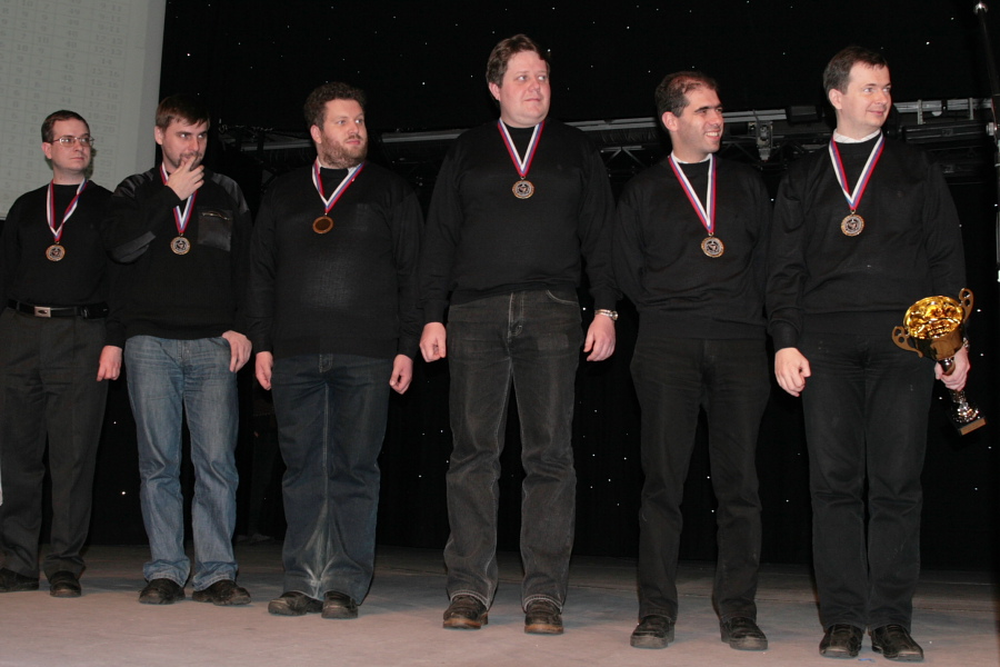 Команда Кузьмина на церемонии награждения призёров VII чемпионата России по «Что? Где? Когда?». 25 февраля 2007 года, культурно-развлекательный комплекс «Пирамида», Казань.